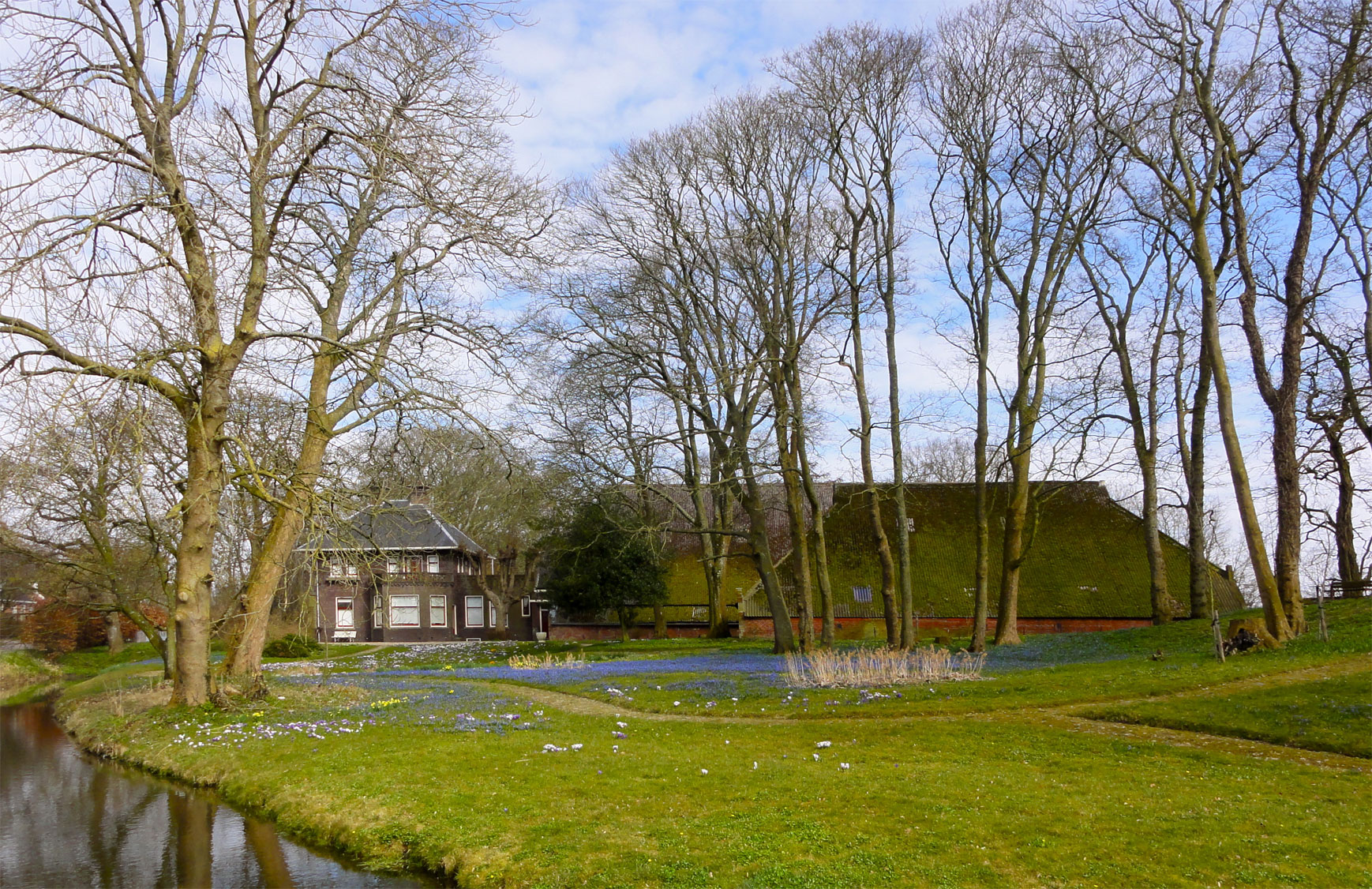 Boerderij Meyma aan de Meijmaweg 4 te Rasquert